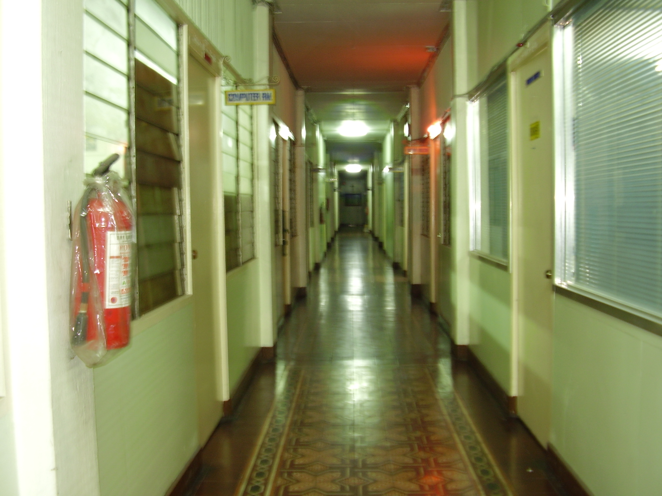 Buttenbruch Corridors